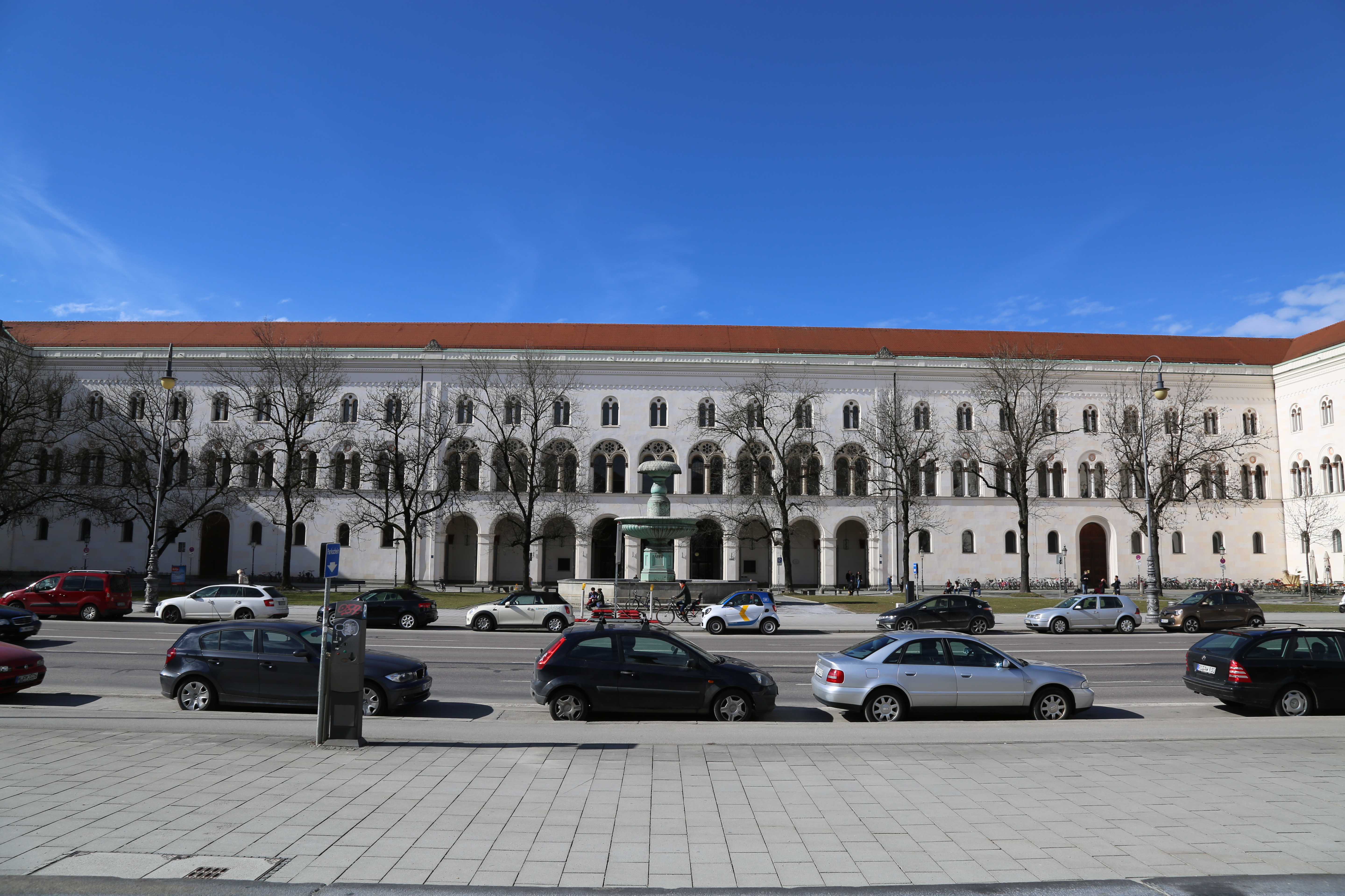 Das LMU-Hauptgebäude im Jahr 2017